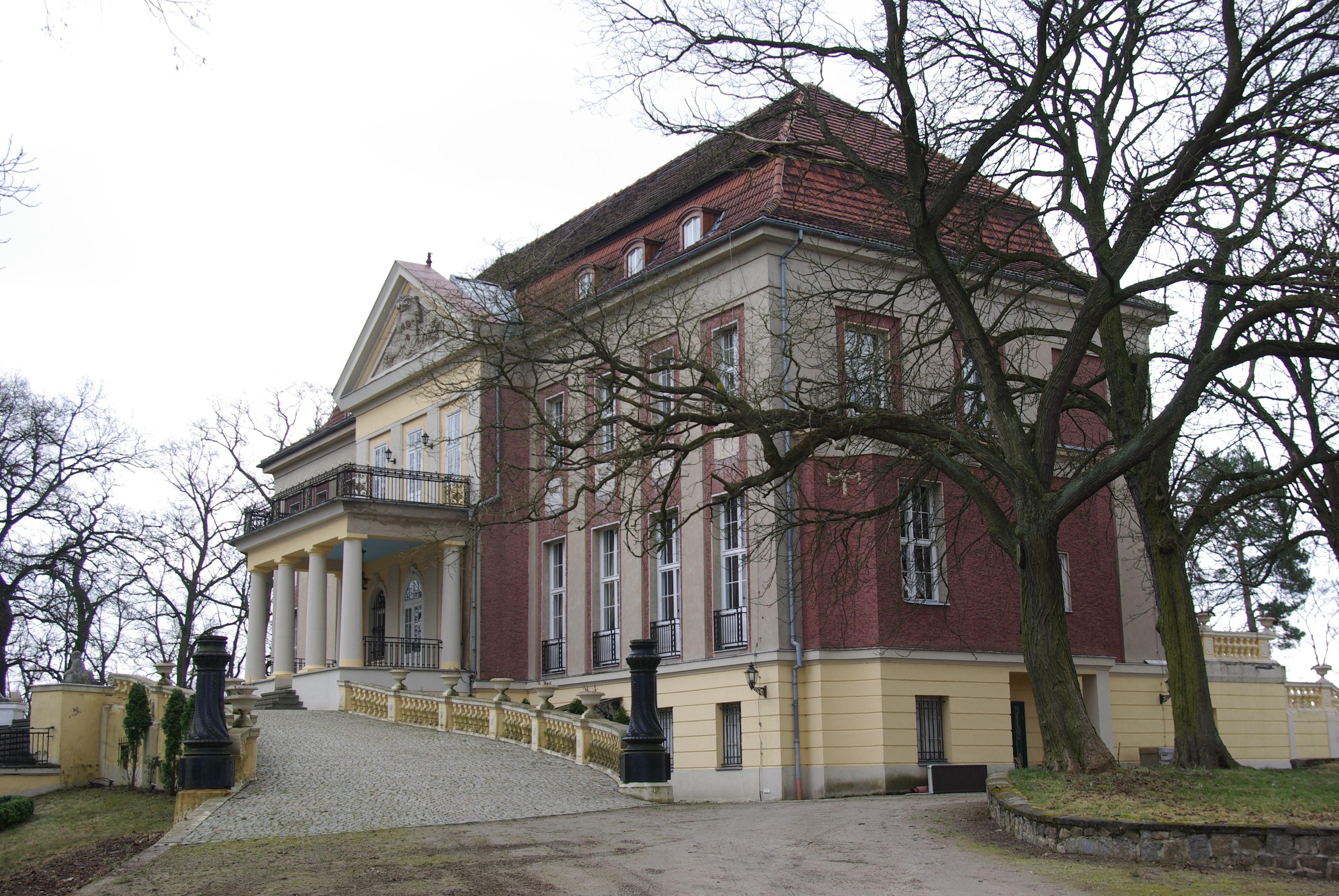 Briesen, Halbe in Brandenburg. Das Gutsschloss ist von 1910 bis 1912 im Stil des Neubarocks erbaut worden. Der Park wurde von 1910 bis 1930 errichtet.